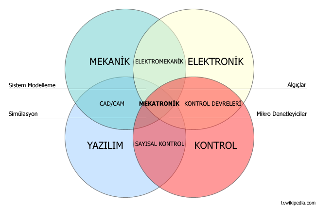 Bu grafik MechatronicDiagram.png (Wikimedia) örnek alınarak en baştan yaratılmıştır. Vektörel şekilde yeniden düzenlenebilir durumdadır. Turkay